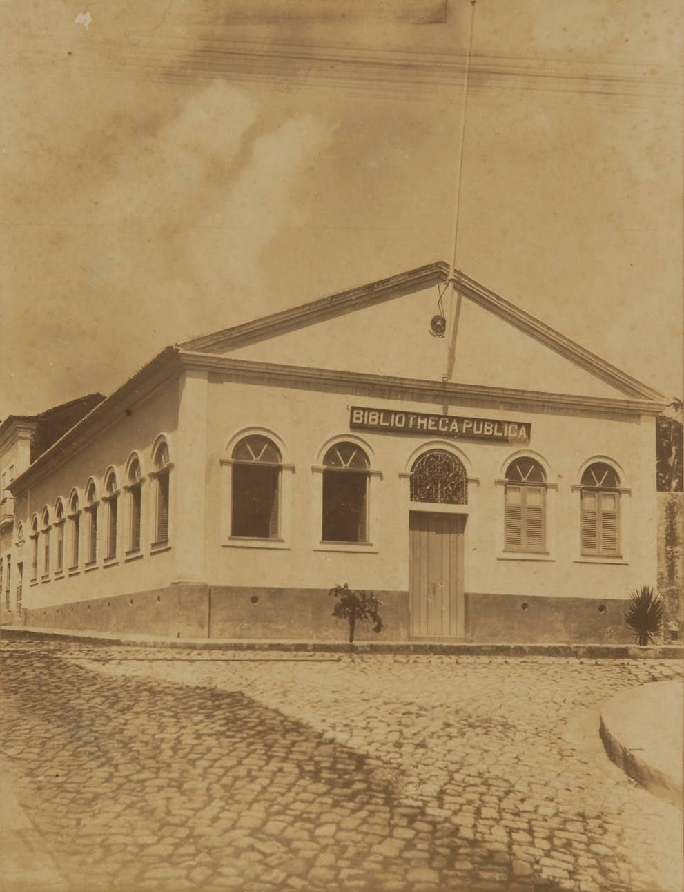 Biblioteca Pública do Maranhão em 1908